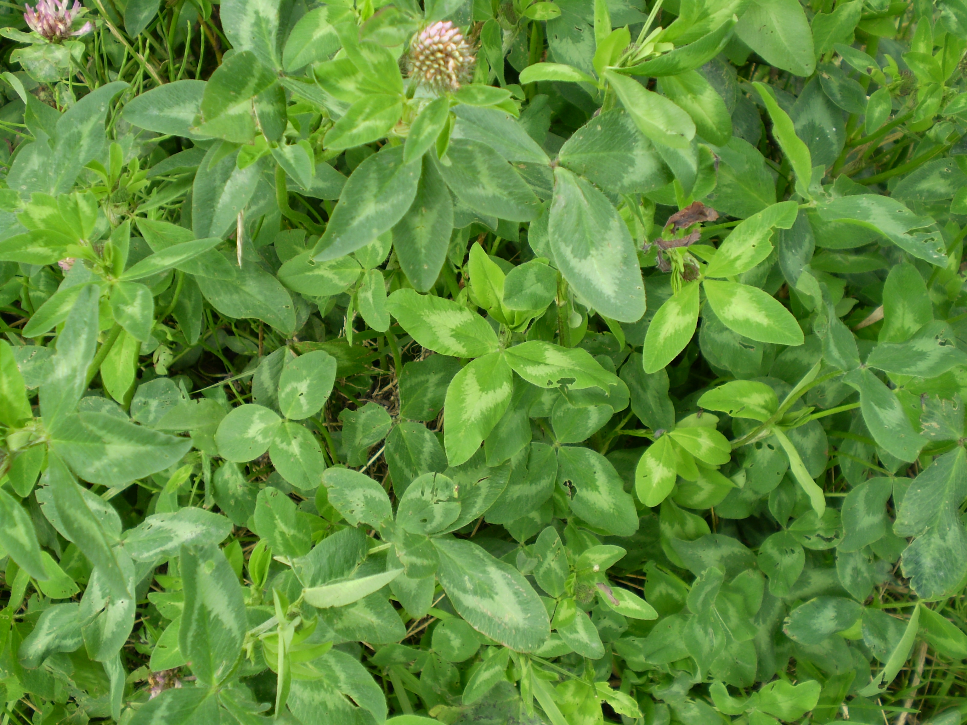 Listy ďateliny lúčnej.